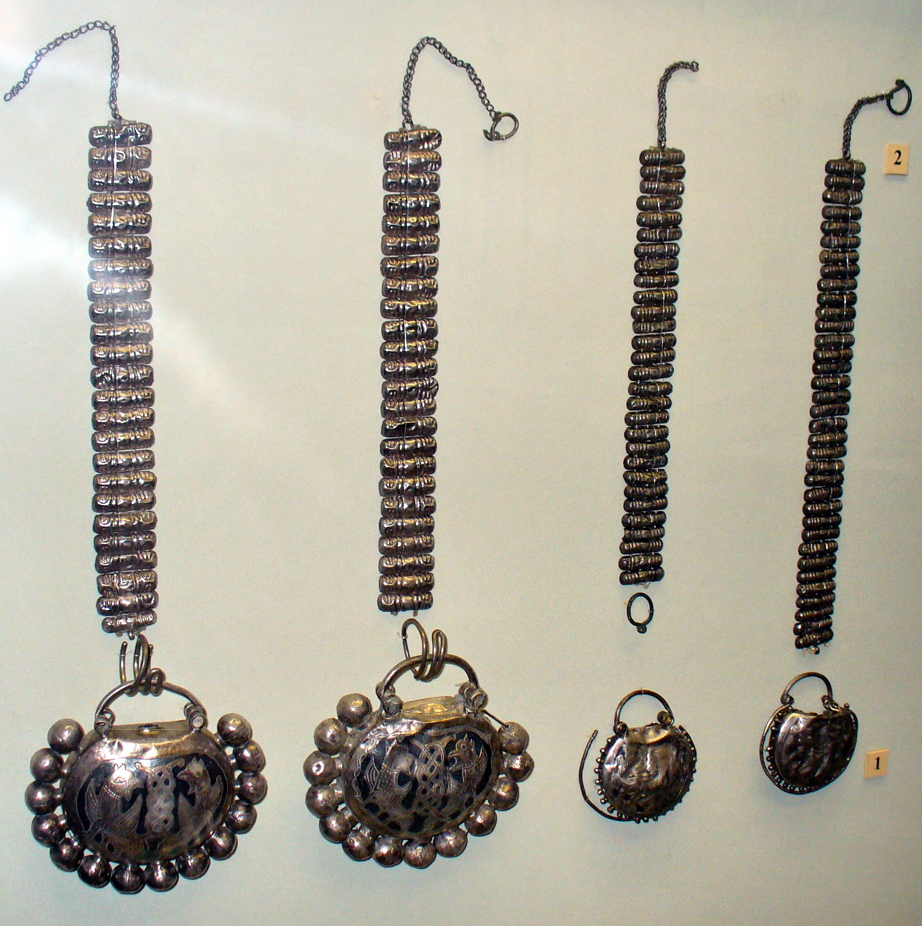 Клад из урочища Святое Озеро у с. Низовка Черниговской области. 1 - парные колты. 2 - цепи из колодочек для крепления колтов. Русь, XII - первая четверть XIII века.